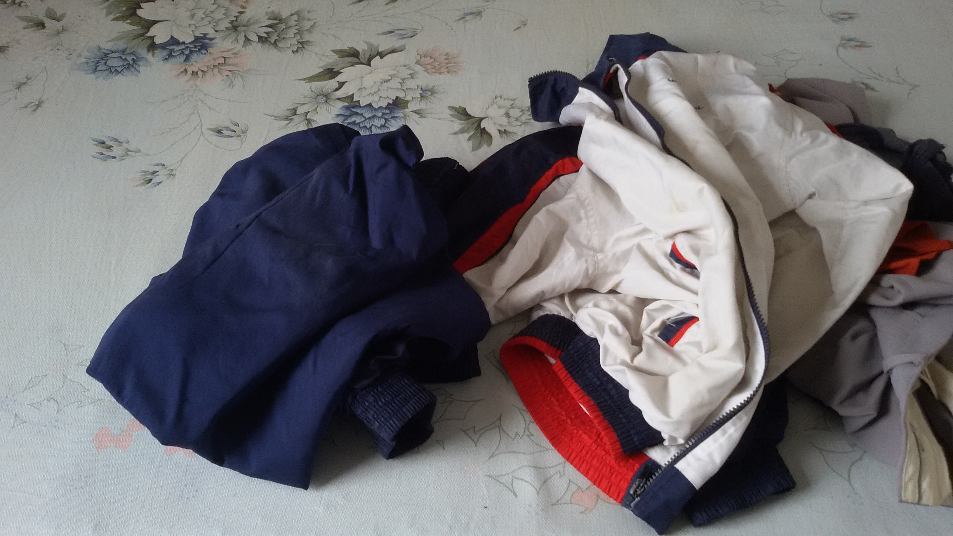 粵語: 廣州市第12中學嘅校服（長袖衫，2004～2007年）